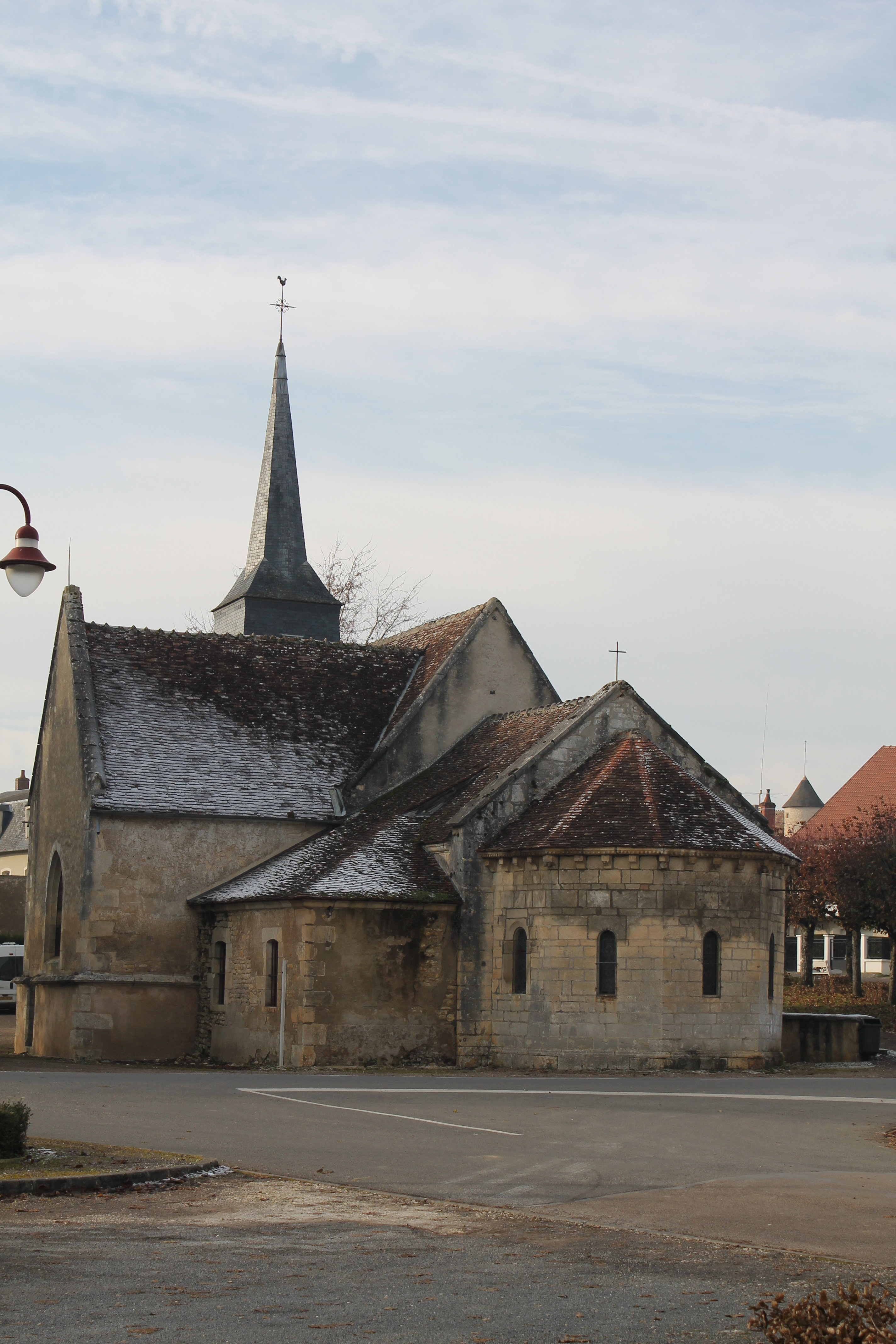 Église Saint-Martin de Garchy (XIIème siècle, classée)